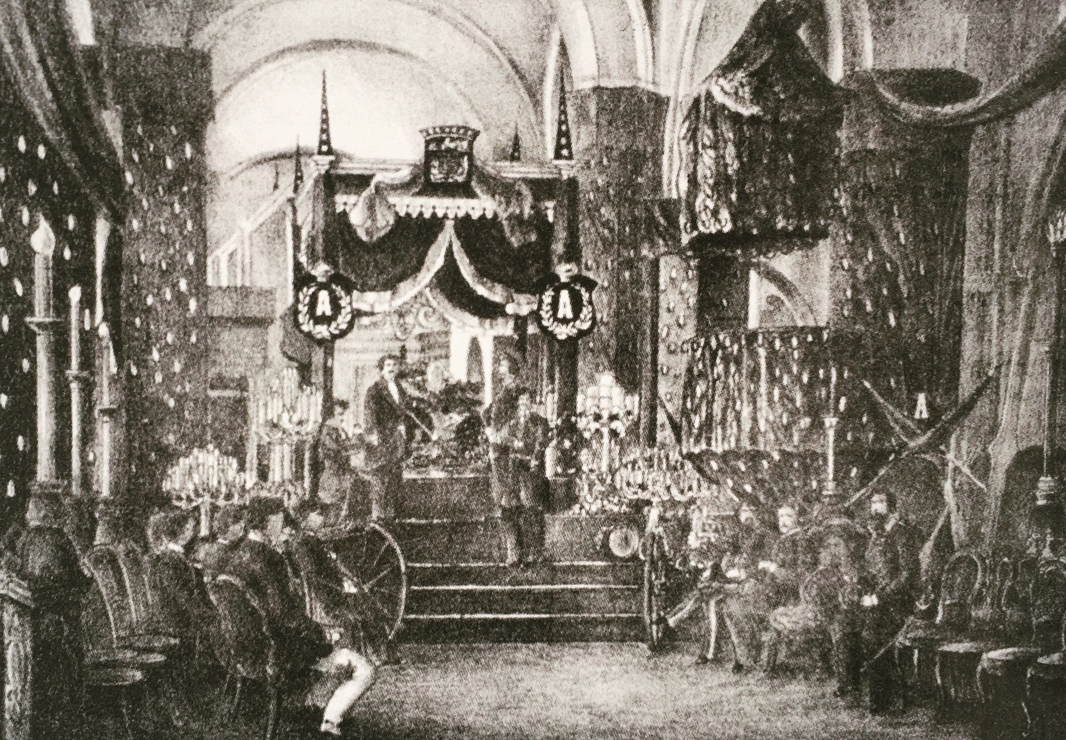 Capilla ardiente y catafalco del Gran Demócrata Francisco Linares Alcántara en la Catedral de Caracas.